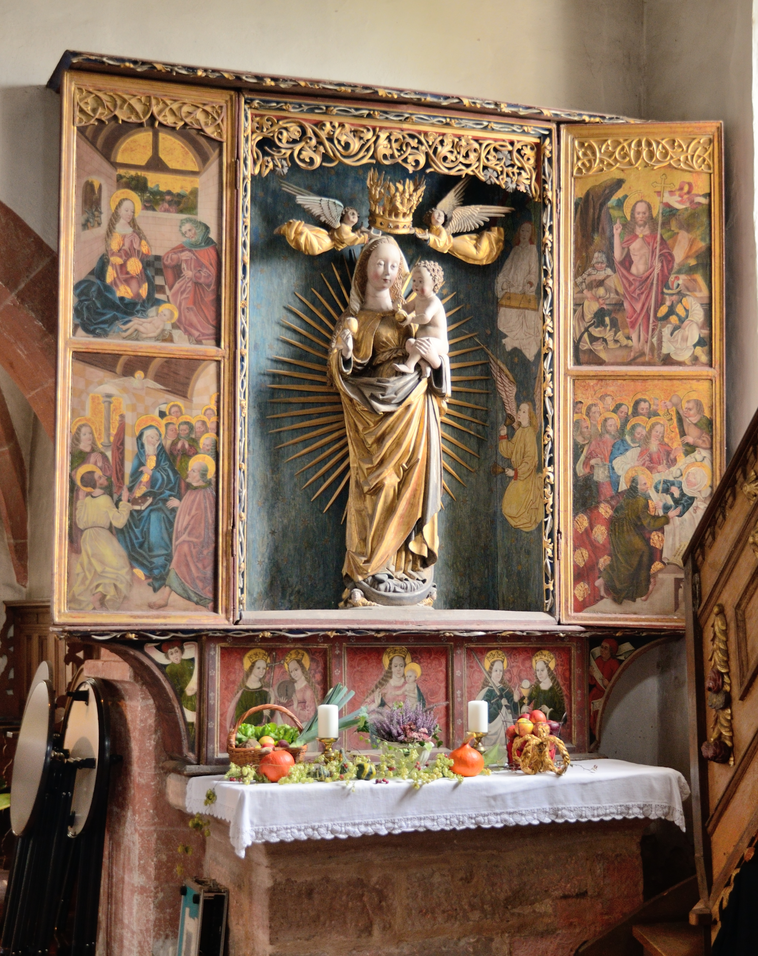 St. Veitskirche (Veitsbronn), Marienaltar